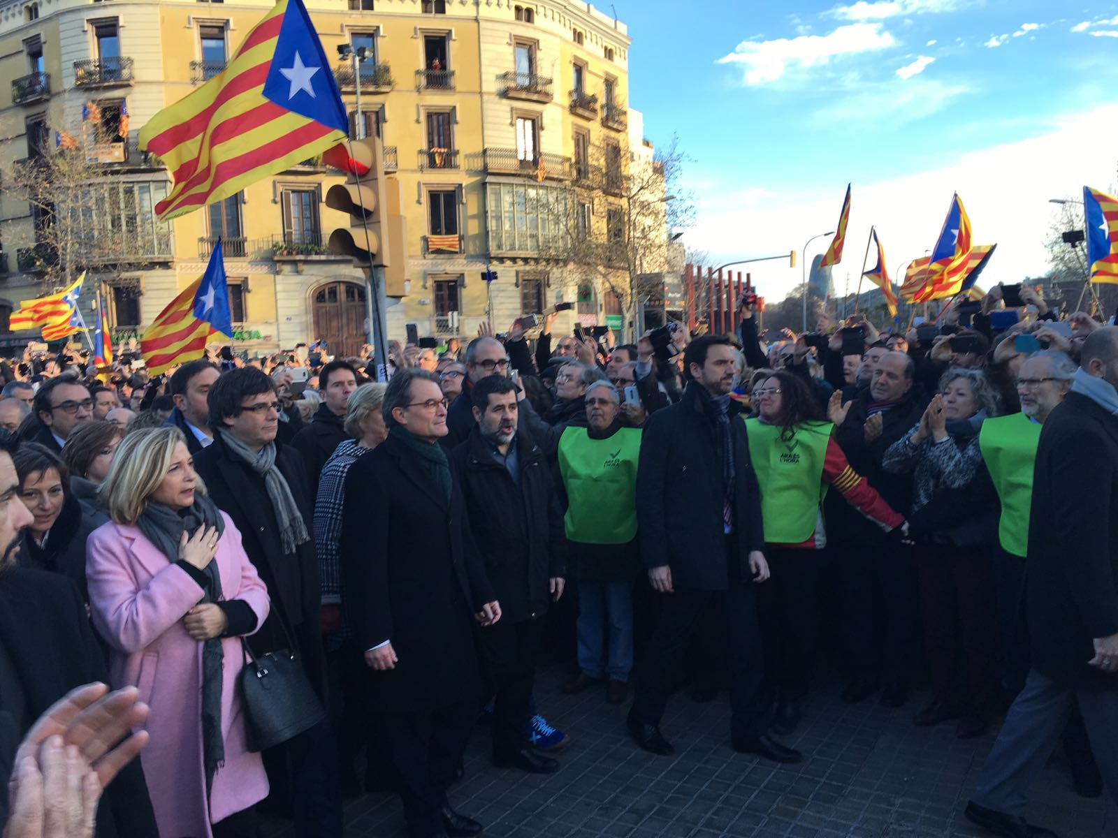 Artur Mas, Joanna Ortega i Irene Rigau, acompanyats de Carles Puigdemont (President de la Generalitat), Jordi Sànchez (ANC) i Carme Forcadell (Presidenta del parlament), entre altres, de camí al Palau de Justícia de Barcelona. Agraïment especial a Albert Isern per facilitar-me la captura d'aquesta imatge.